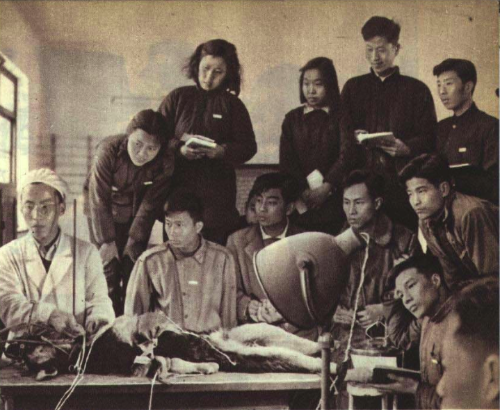 1952 北京农业学院畜牧系